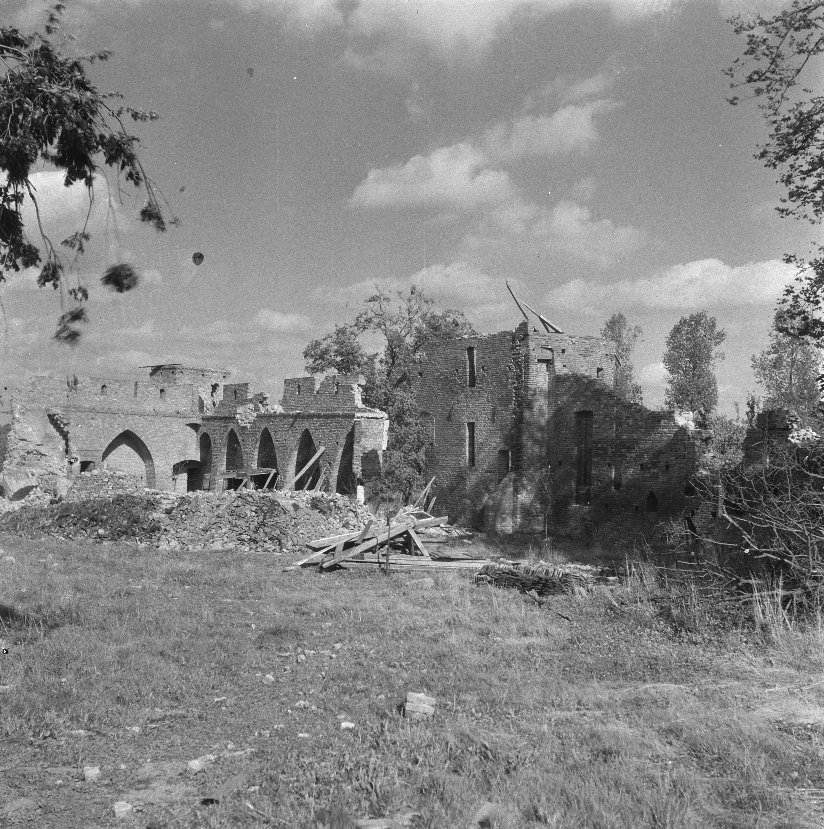 Collectie / Archief : Fotocollectie Anefo Reportage / Serie : Vernielingen Gendt en Doornenburg Beschrijving : Kasteel Doornenburg Datum : 1945 Locatie : Doornenburg Trefwoorden : kastelen, monumenten, vernielingen Fotograaf : Fotograaf Onbekend / Anefo Auteursrechthebbende : Nationaal Archief Materiaalsoort : Negatief (zwart/wit) Nummer archiefinventaris : bekijk toegang 2.24.01.03 Bestanddeelnummer : 900-8219